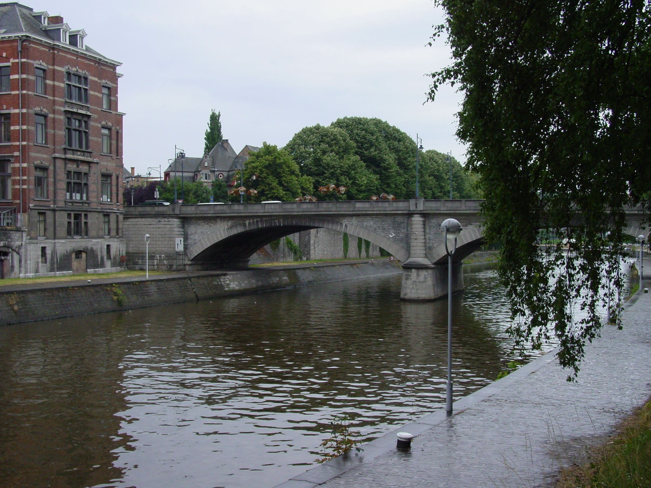 Namur, la Sambre, le Pont de la Libération - Photo: Benoît Cassart Benoît Cassart